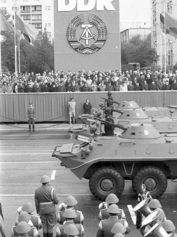 Berlin, 40. Jahrestag DDR-Gründung, Pparade ADN-/ZB-Reiche/ 7.10.89 / Berlin: 40. Jahrestag DDR, Ehrenparade SPW 70 des Truppenteils "Hans Beimler". [Berlin.- Parade von Schützenpanzerwagen 70 vor Ehrentribüne mit Ehrengästen und DDR-Symbol]